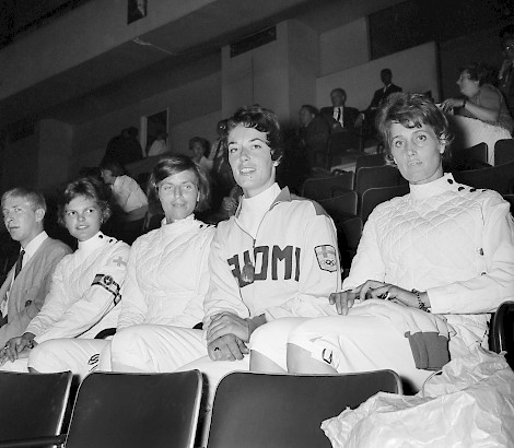 Suomalaisia miekkailijoita MM-kilpailuissa Pariisissa 1965: vasemmalta Irma Ivanoff (nyk. Lindeman), Yrsa Gallen, Barbara Helsingius ja Marjatta Moulin.